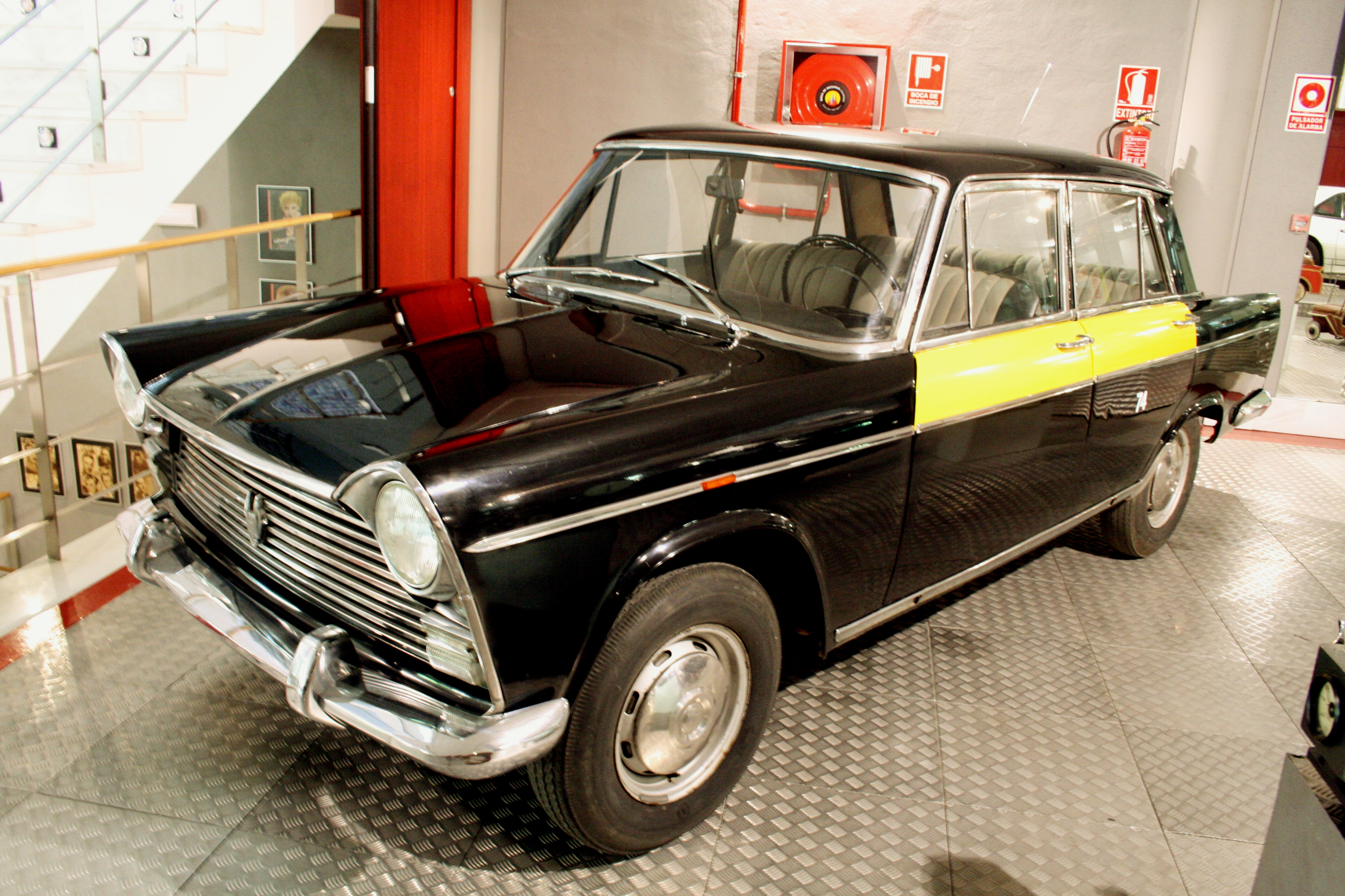 Taxi de Barcelona